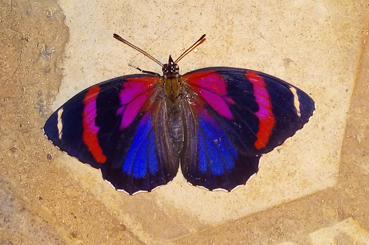 Exemplar de Callicore sorana fêmea na cidade de Caetité, Bahia, Brasil. (fotografia em parceria com: Fabiano Miranda)